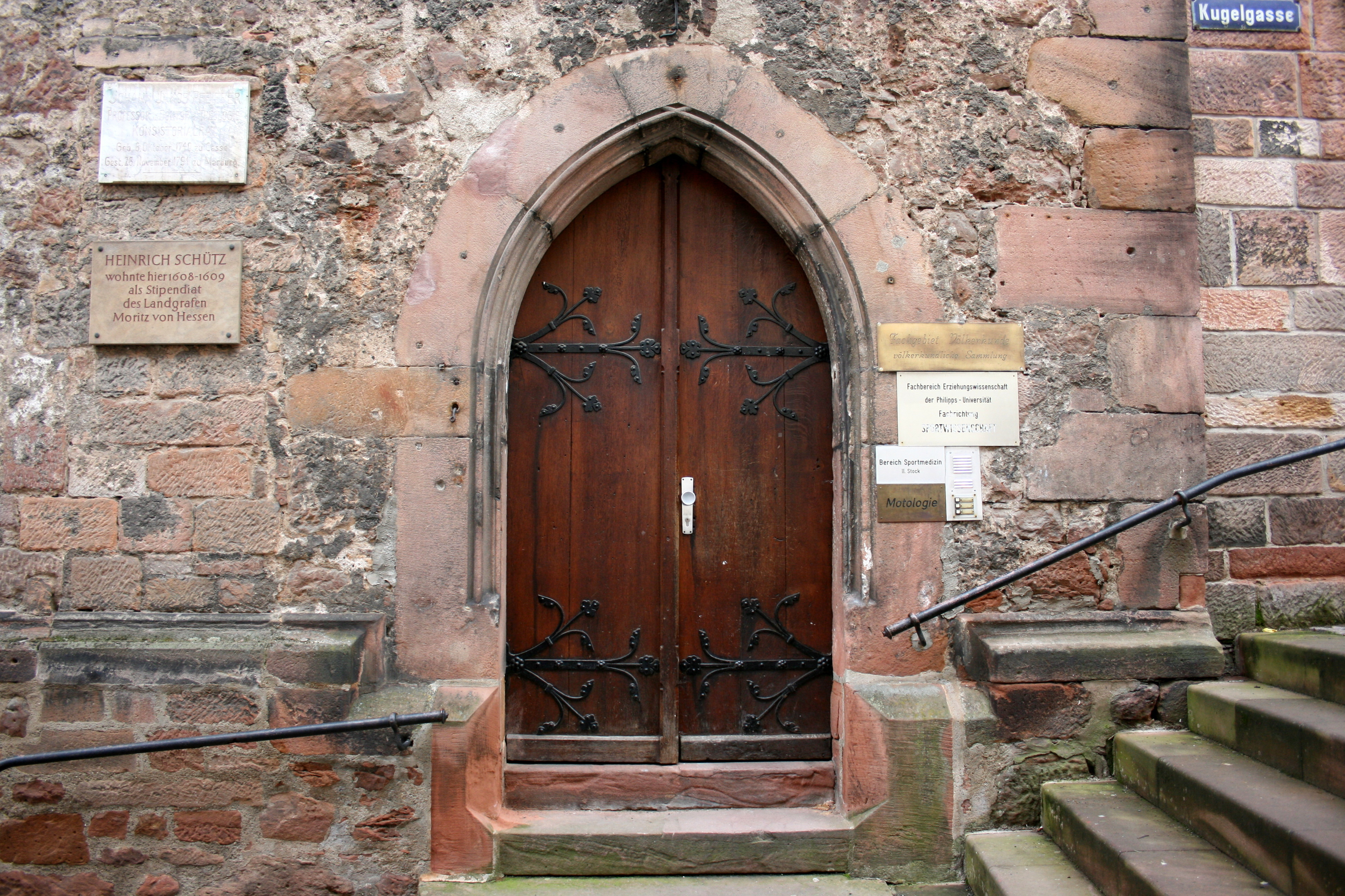 Kugelgasse in Marburg